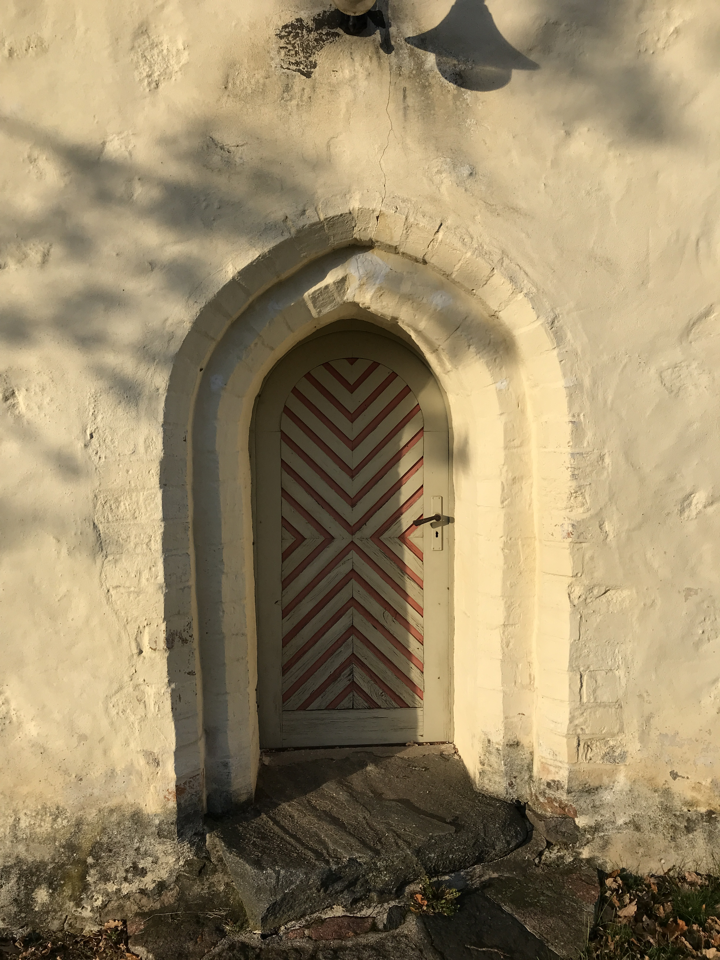 Die Dorfkirche Worin in der Gemeinde Vierlinden im Landkreis Märkisch-Oderland ist eine Feldsteinkirche aus dem 15. Jahrhundert. Im Innern steht unter anderem ein schlichter Kanzelaltar aus der Mitte des 19. Jahrhunderts